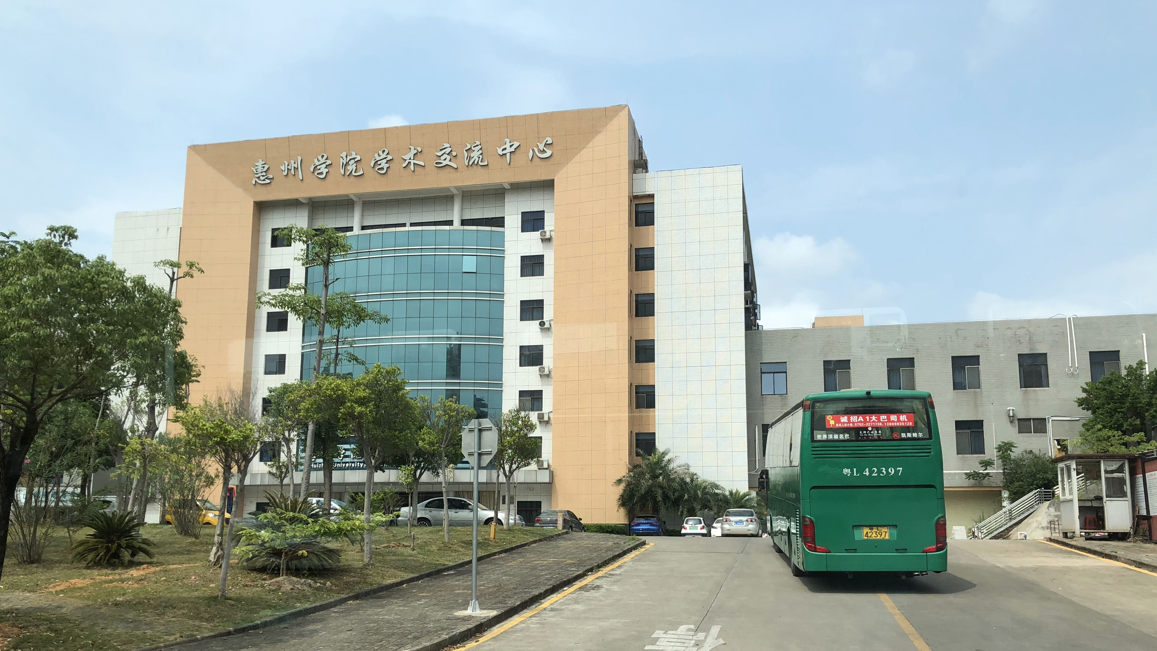 中文（中国大陆）: 惠州学院国际交流中心